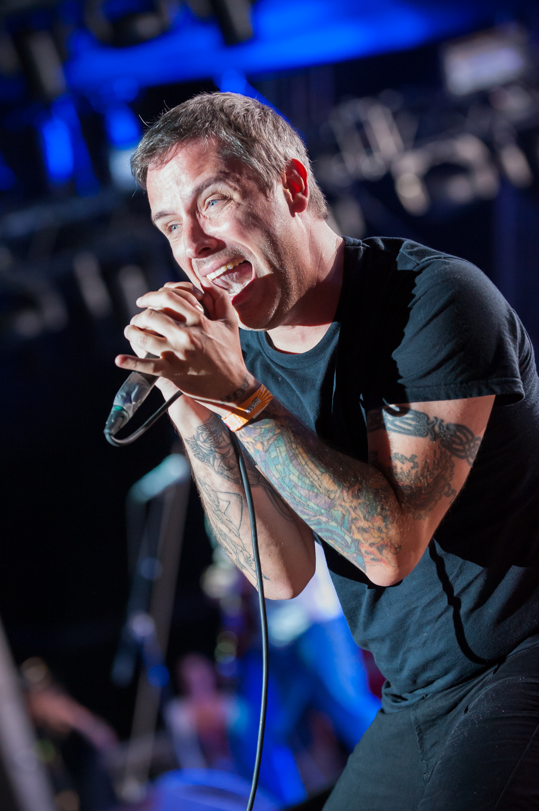 Nathan Gray, Sänger und Gründungsmitglied von der Punkband "boysetsfire", beim Rockfestival Rocco del Schlacko im August, 2012.